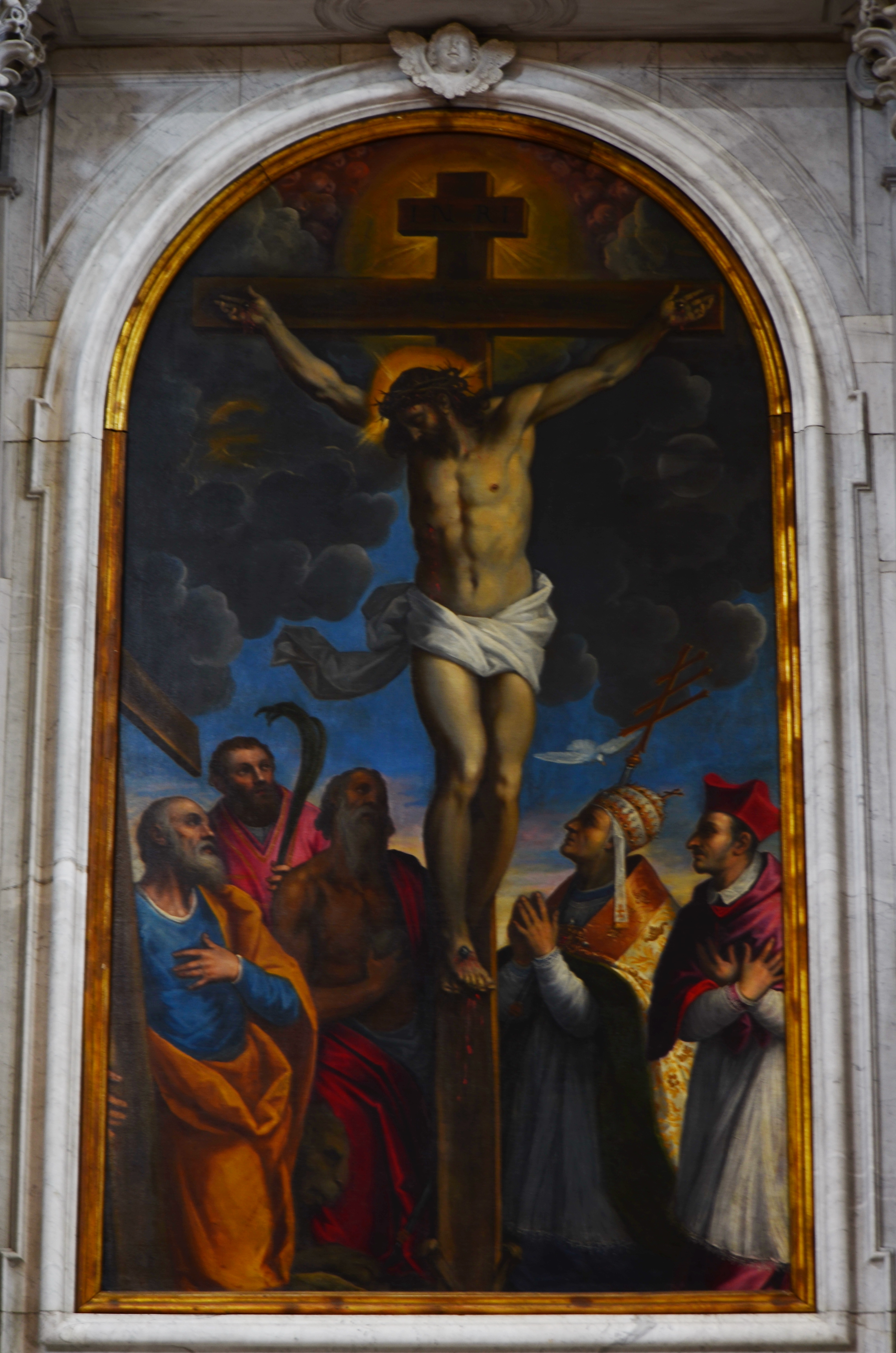 Duomo di Cividale - Interno Crocifissione (1a Pala navata destra)